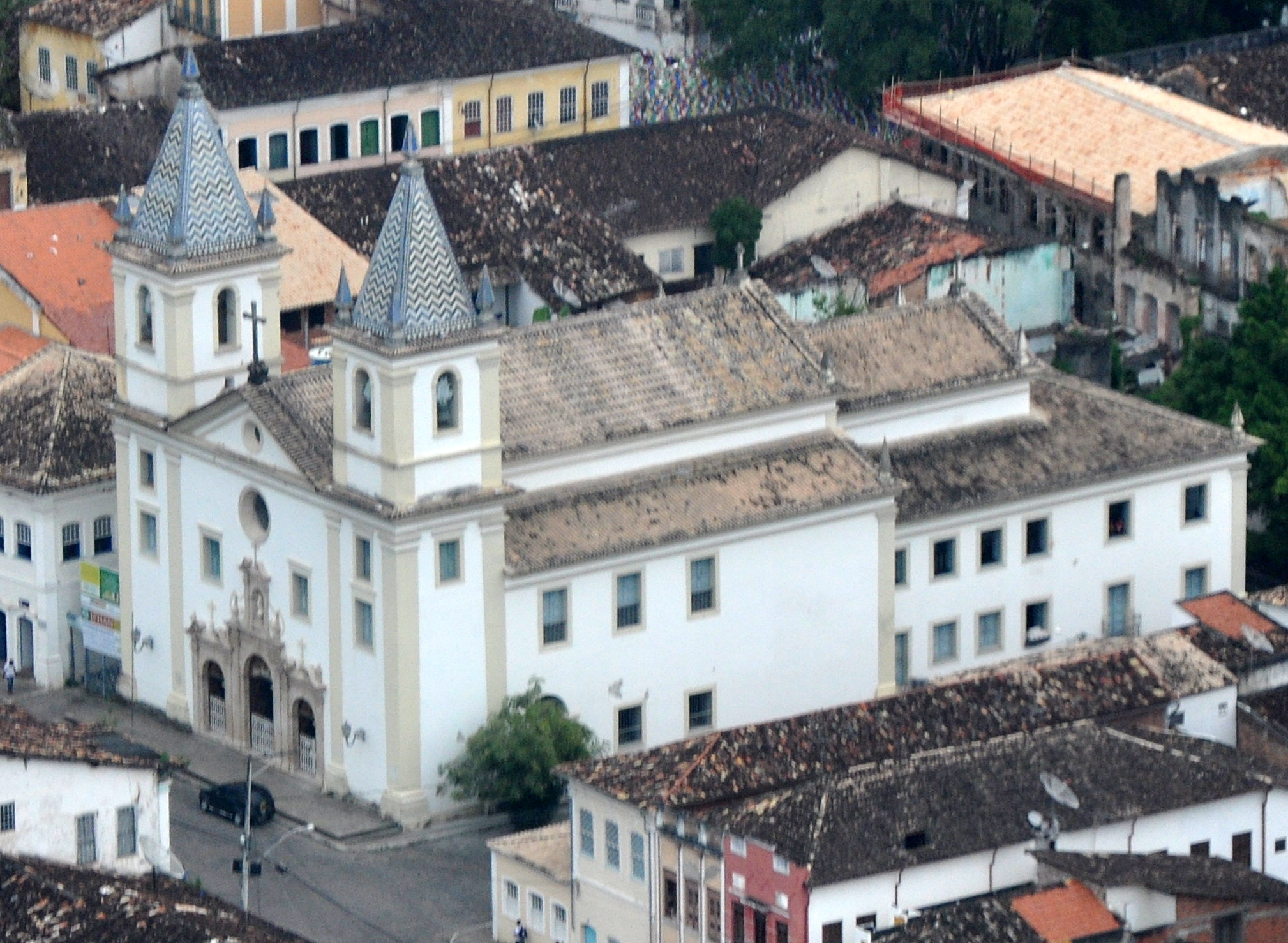 Igreja Matriz de Nossa Senhora do Rosário, Cachoeira